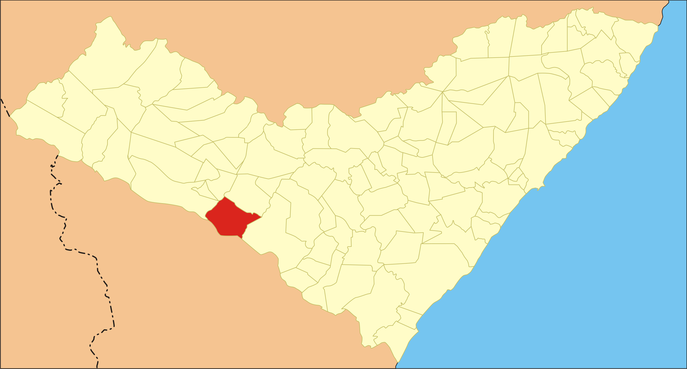 Localização da cidade no estado de Alagoas.